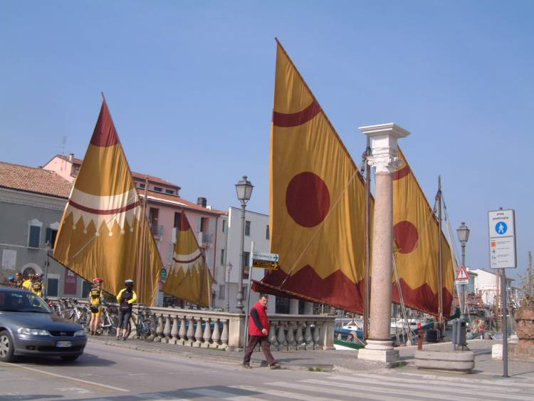 Je suis l'auteur de cette photo réalisée en avril 2007